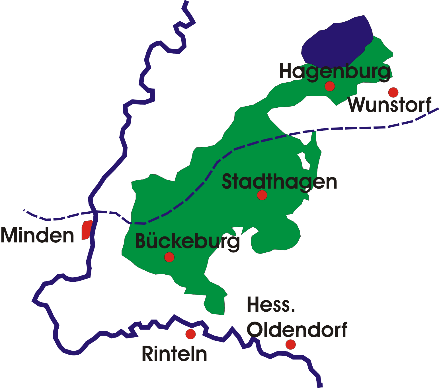 Schaumburg-Lippe selbst gezeichnet